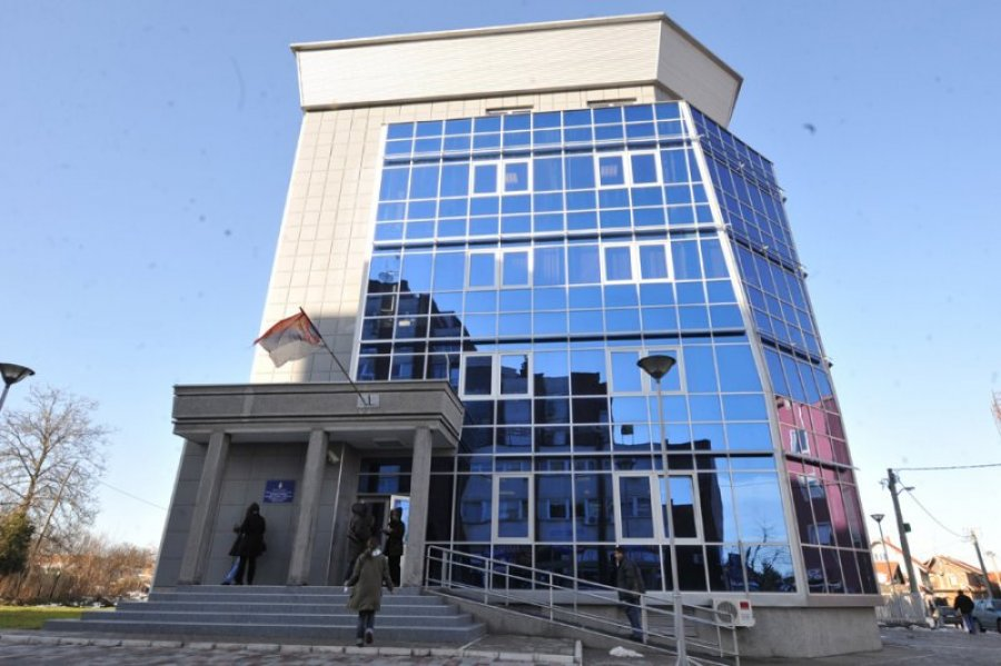 Neka državna zgrada u Velikoj Plani. Licensing